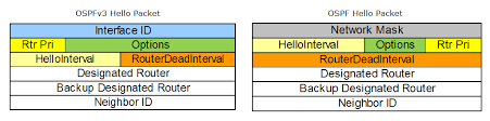 Монгол: ospfv3 vs ospfv2 hello packet